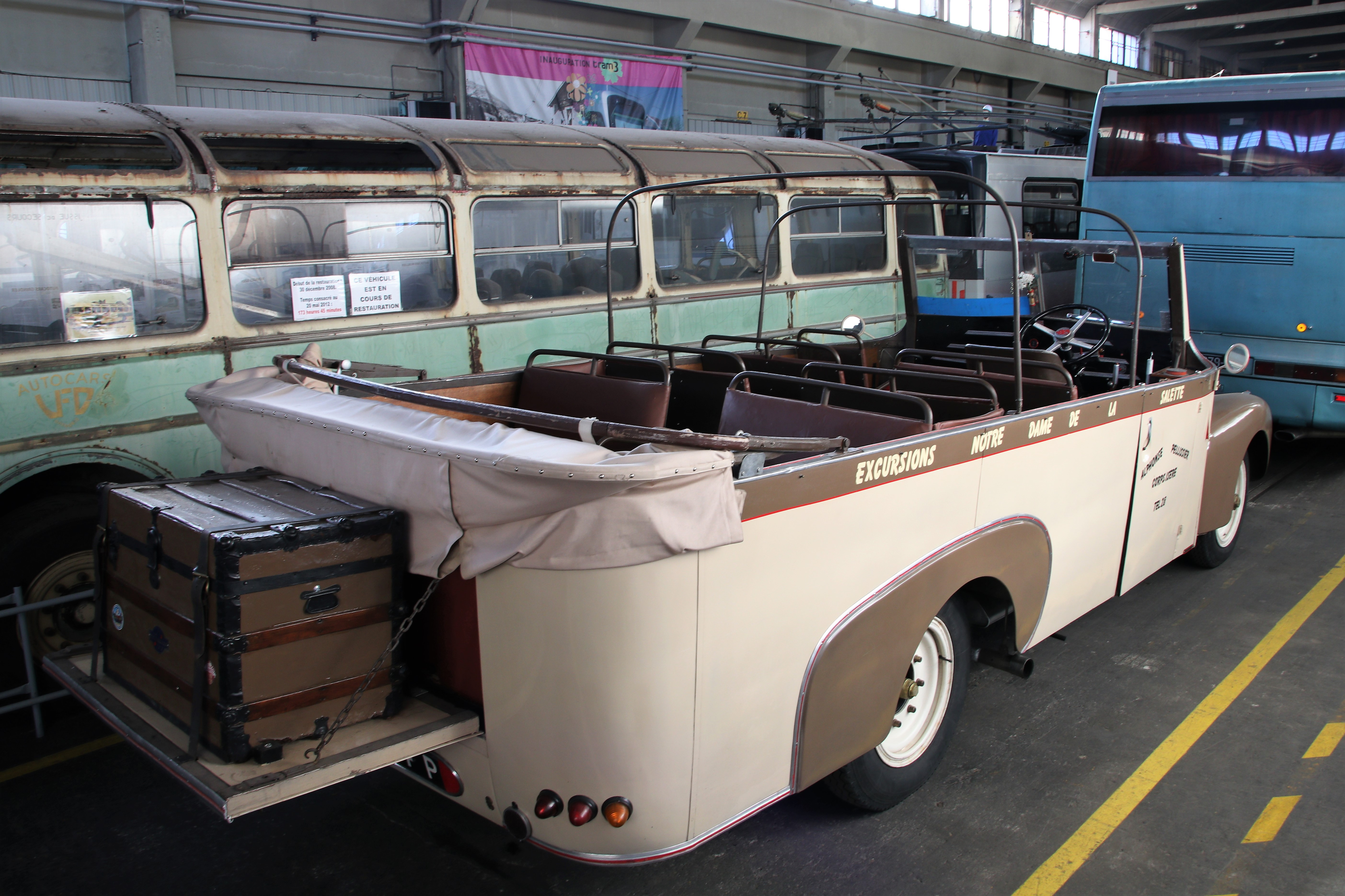 Rochet-Schneider type « Torpédo », autocar pour le transport des pèlerins entre Corps et le sanctuaire de Notre-Dame de la Salette. Conservé à l'espace Histo Bus Dauphinois, Le Pont de Claix, Isère, AuRA, France.